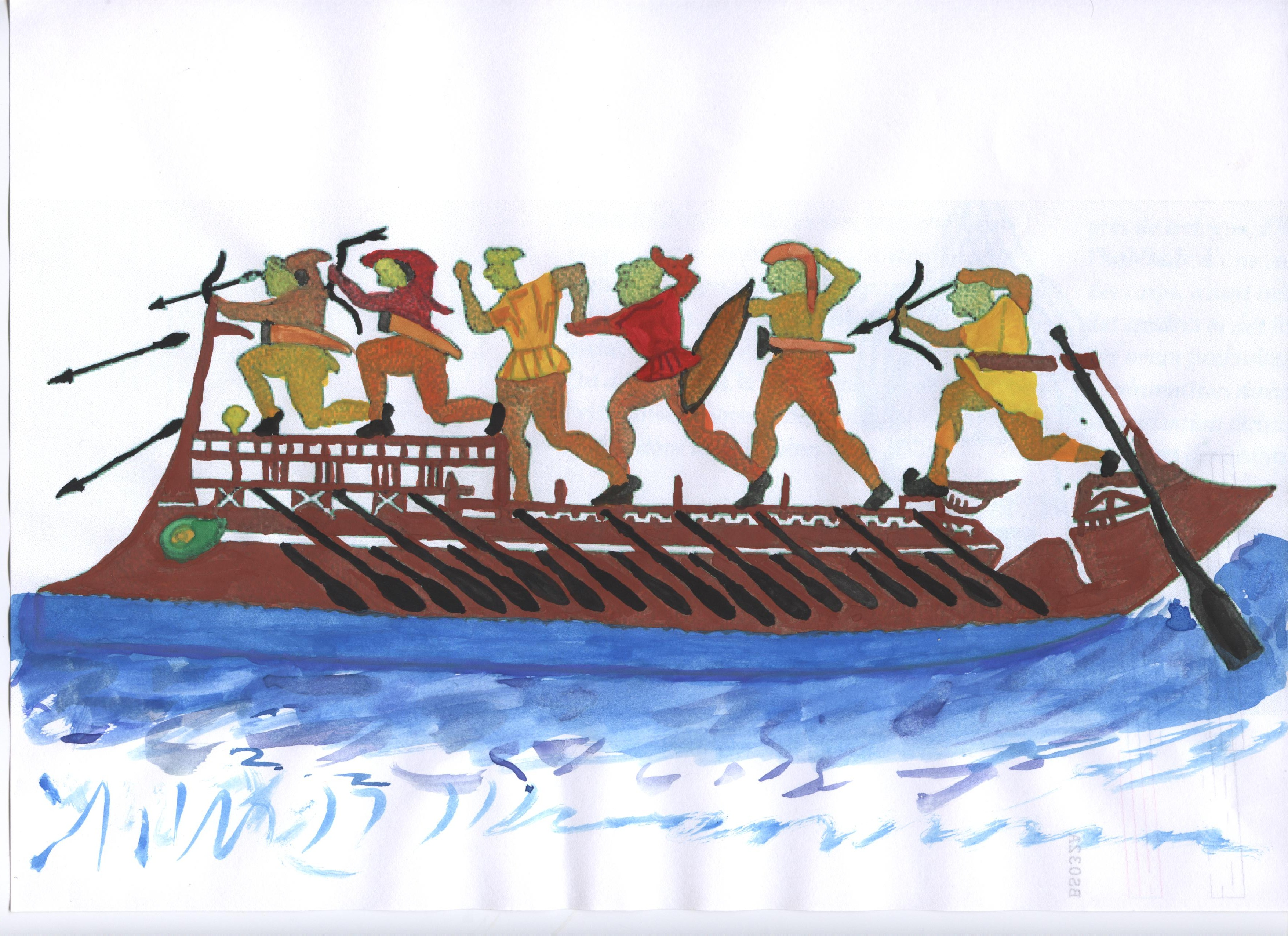 Escena de combate naval en una hidria etrusca, atribuida al pintor de Micali (finales del siglo VI a. C., Museo Británico, Londres.